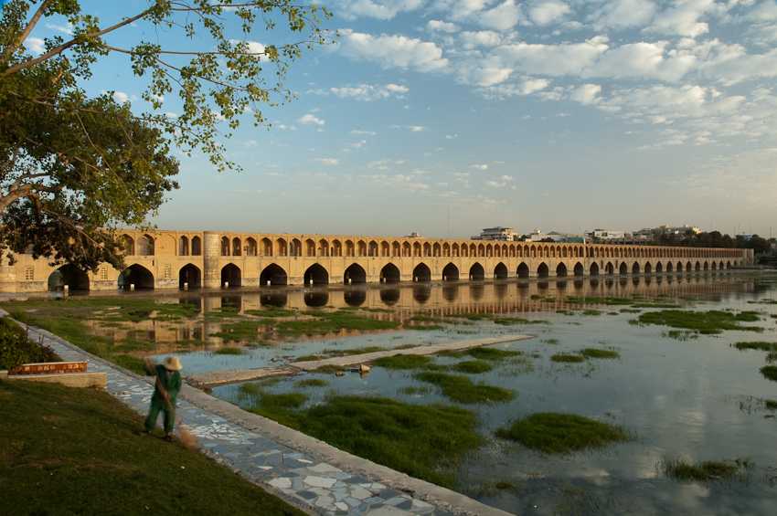 Isfahan-Iran